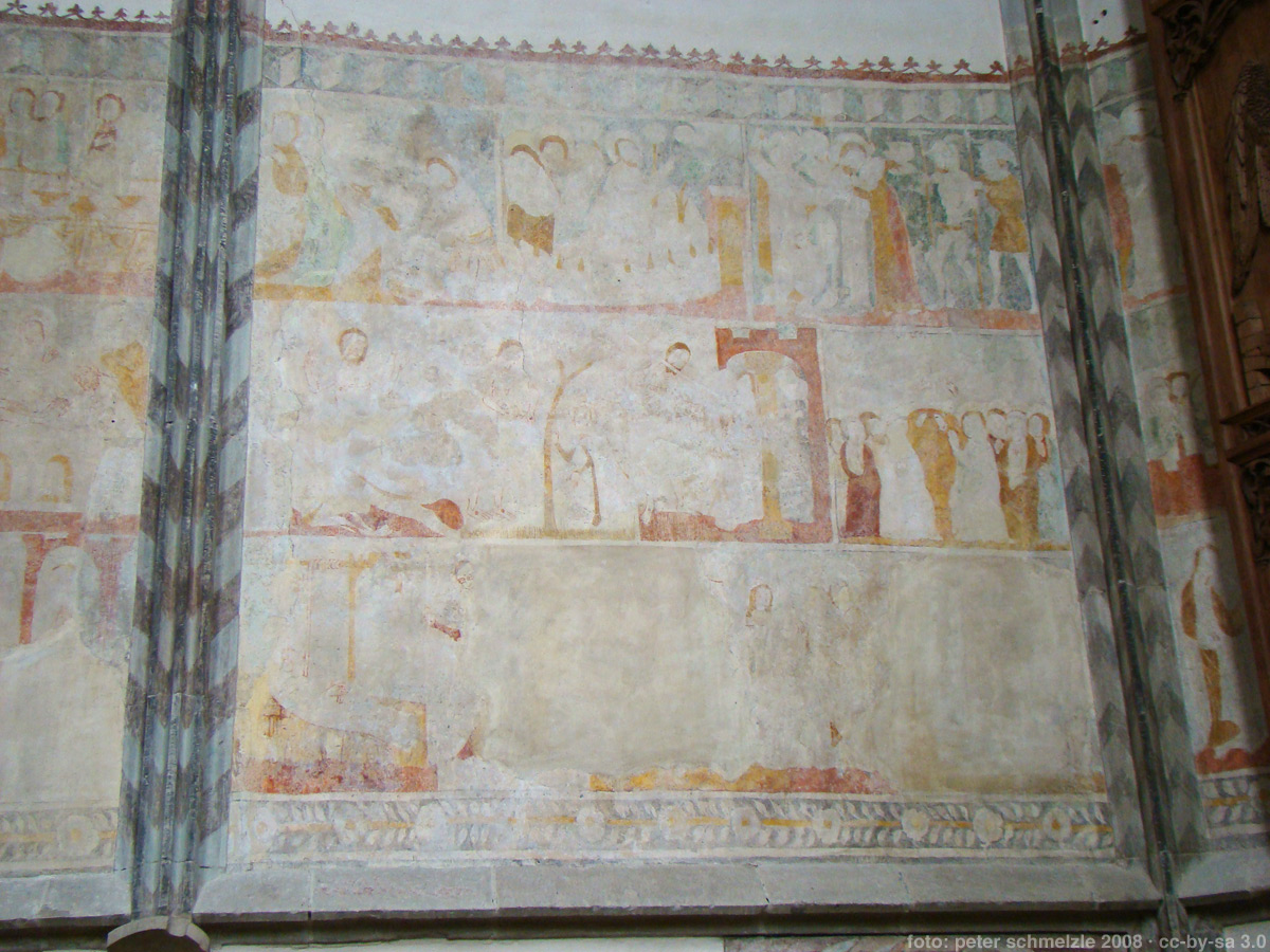 Fresken an der Nordwand des Chors der Stadtkirche Besigheim